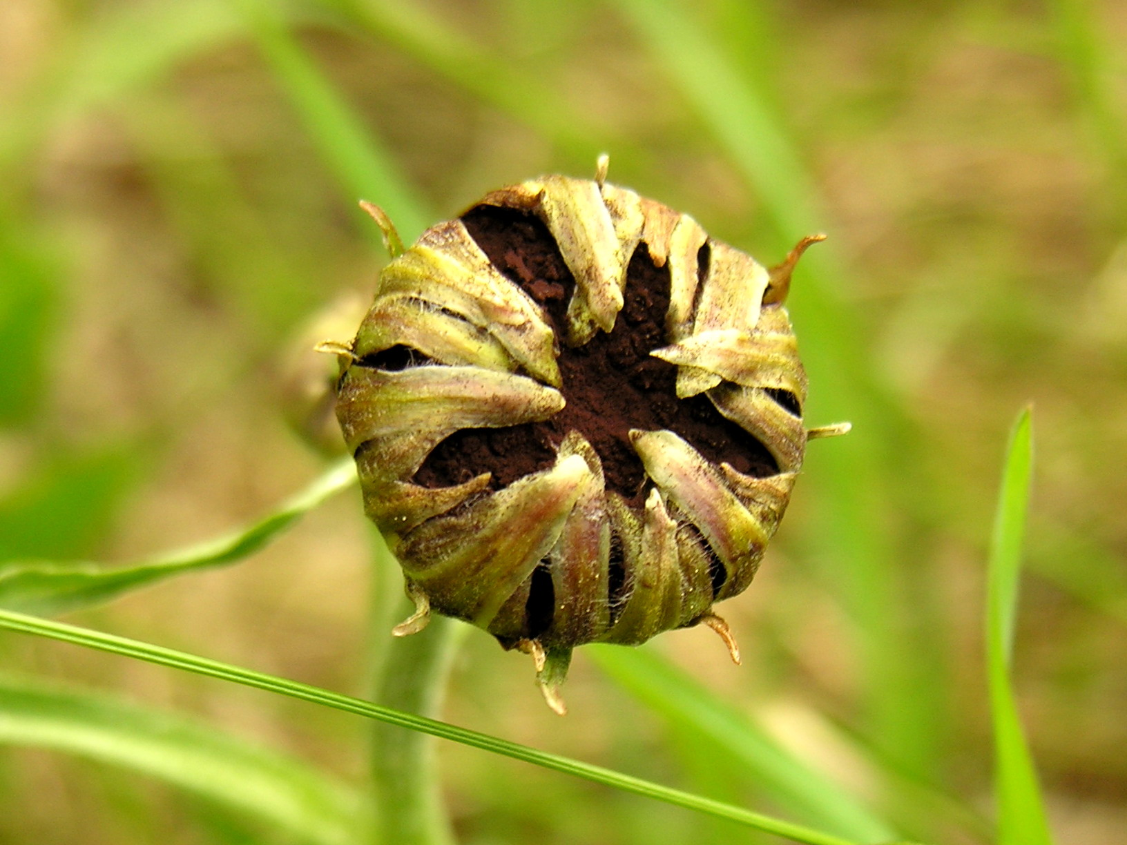 Picture from Letvian Wikipedia. Pušyninės gelteklės (Scorzonera humilis) žiedas Šeima. Astriniai (Asteraceae) Foto: Algirdas, 2006 m. gegužės 20 d., Lietuva